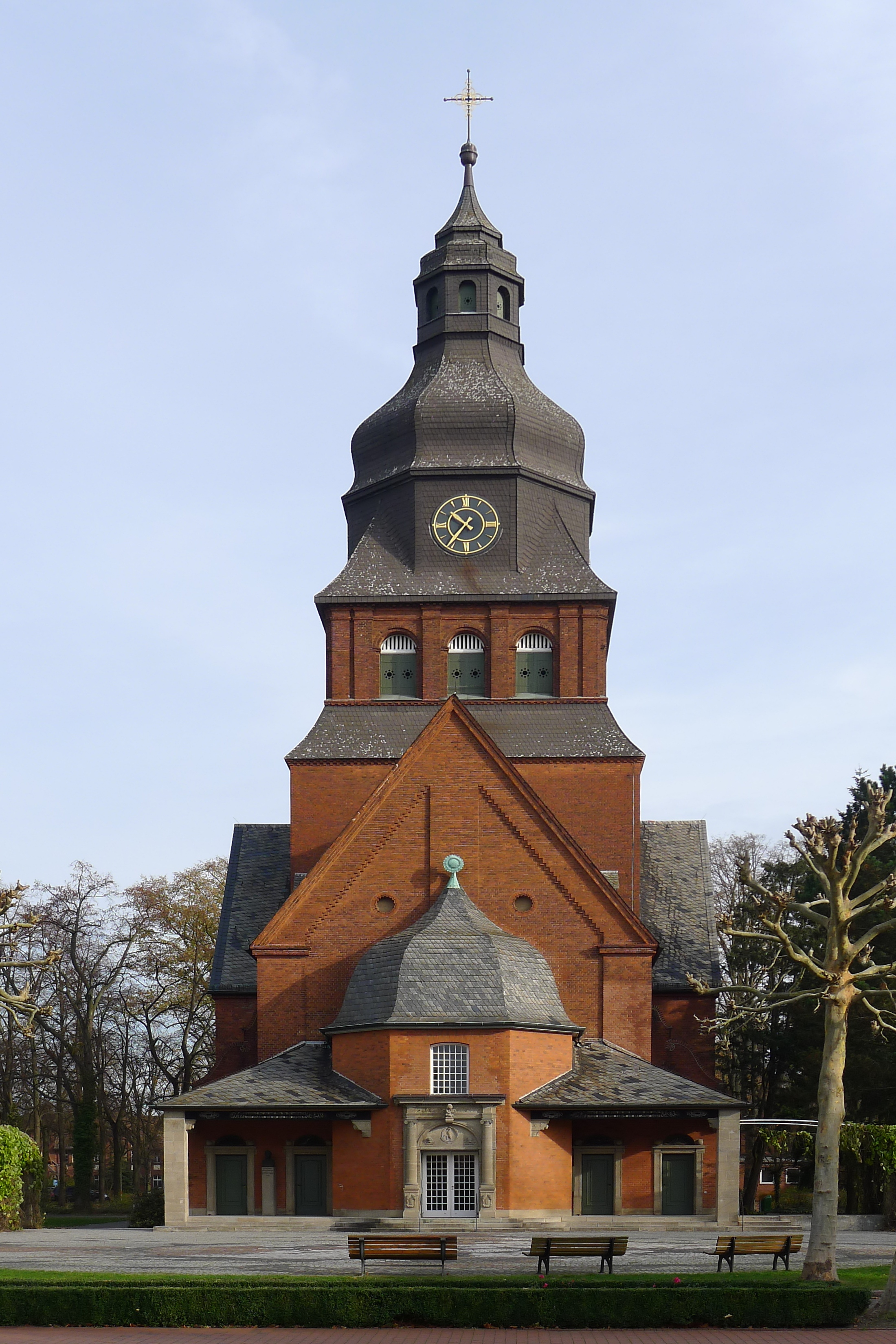 Blick von der Allee zur Kirche